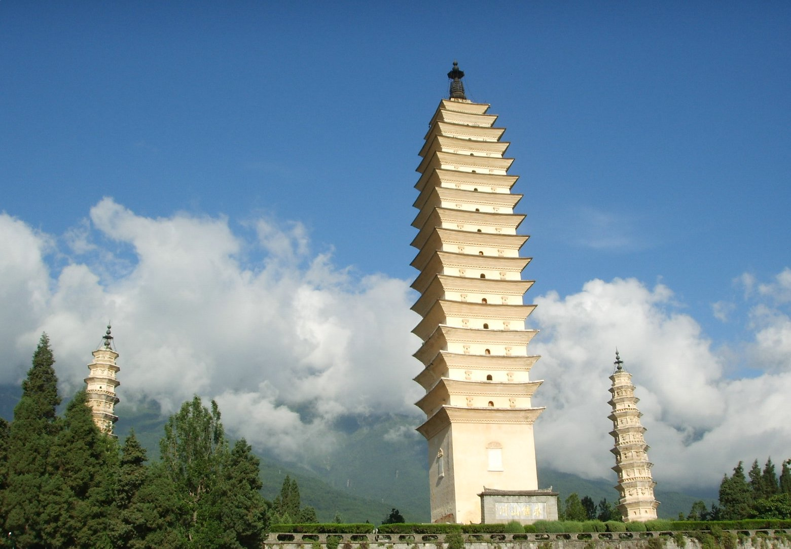 大理三塔